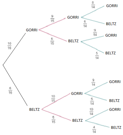 Zuhaitz horizontal finituaren adibidea